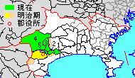 Map of Ashigarakami District, Kanagawa, Japan